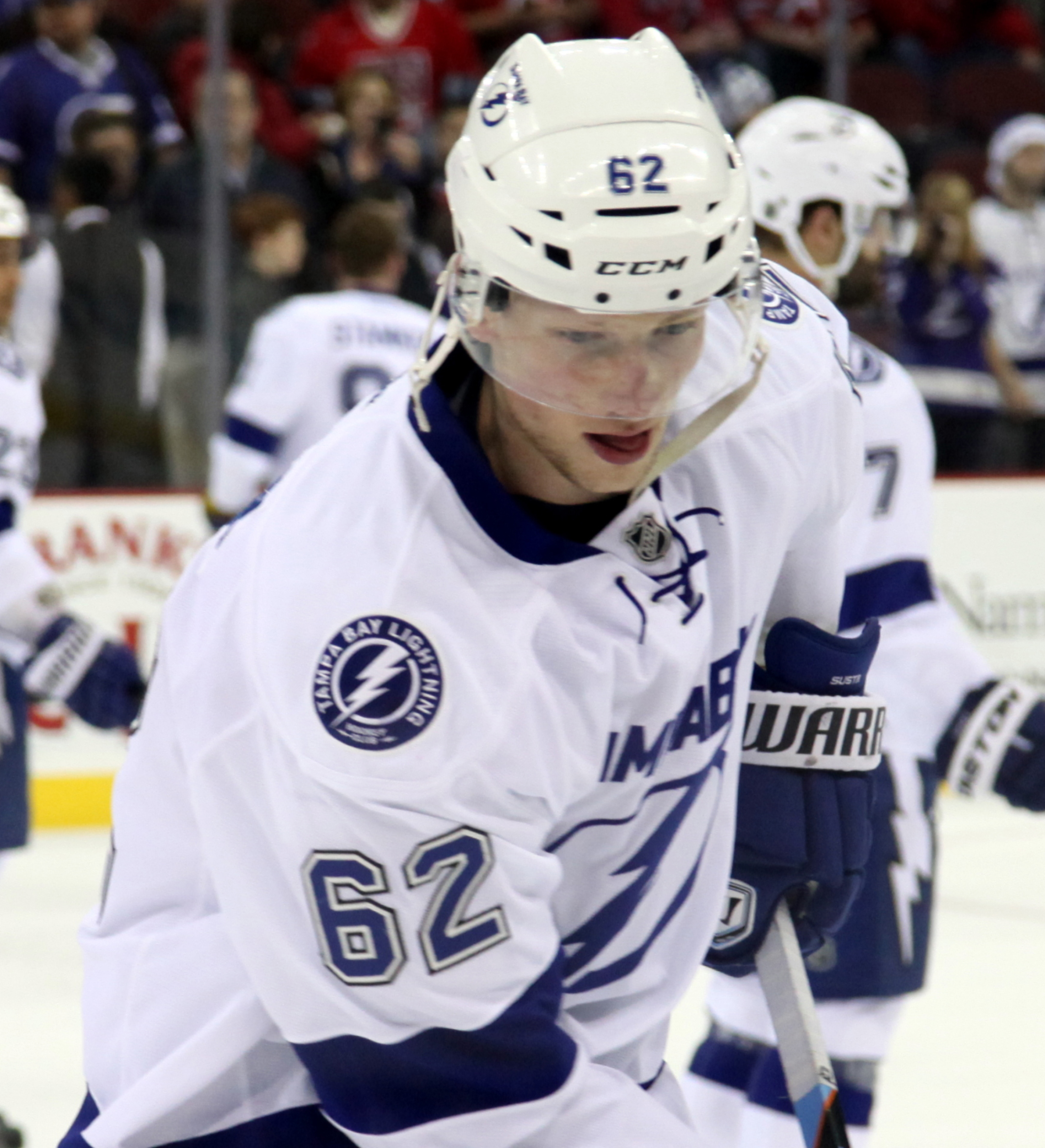 Andrej Sustr in December 2014.